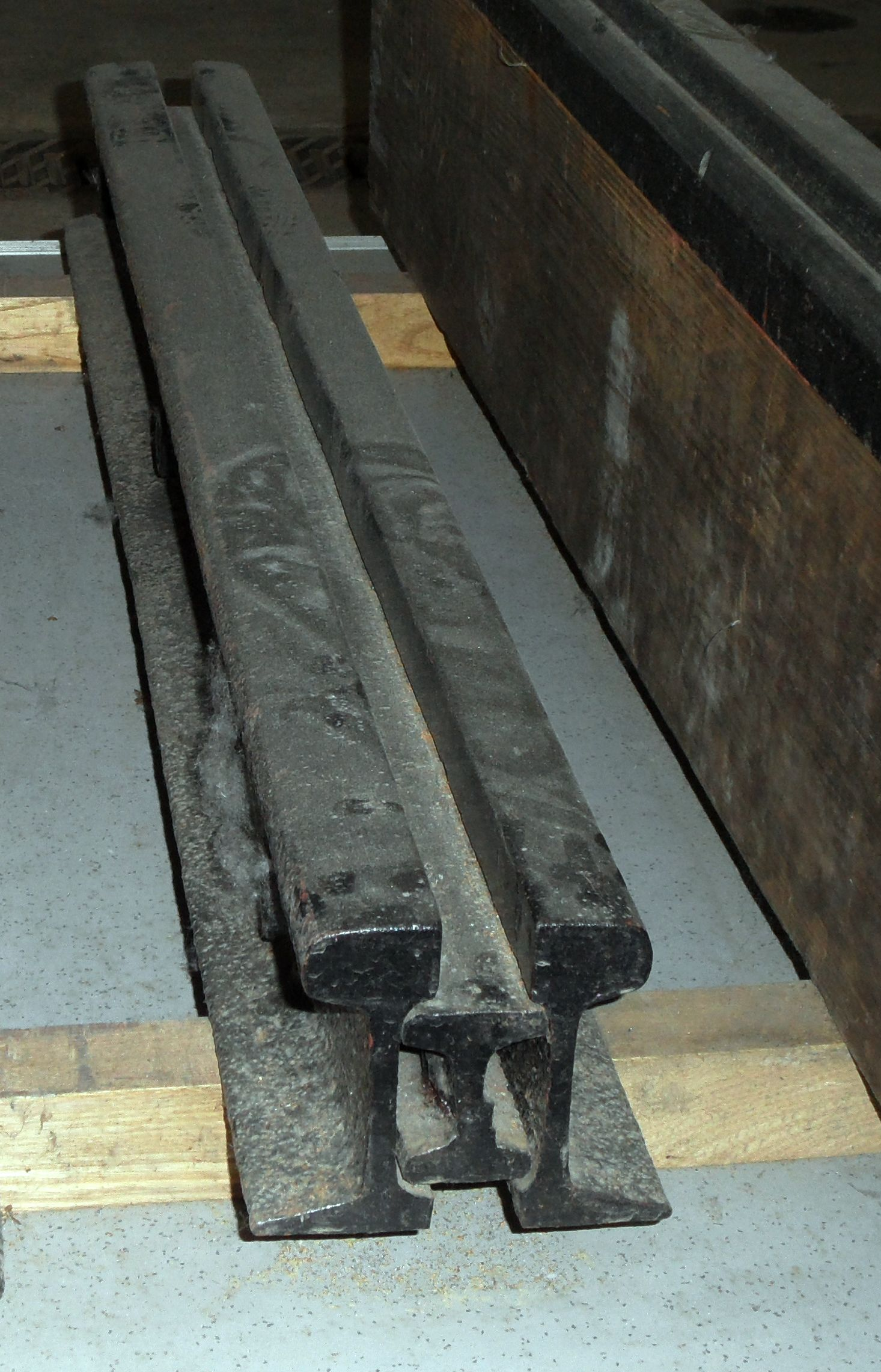 Mehrteilige Bauart Haarmann, im Leipziger Straßenbahnnetz als Ersatz für den mangelhaften Langschwellenoberbau der Bauart Loubat ab 1885 eingebaut, nachteilig waren die im Verhältnis zur Biegesteifigkeit und Tragfähigkeit hohe Metermasse und der mögliche Wassereintritt in die Bettung. Im Zug der Vorbereitung auf die Elektrifizierung wurden diese Schienen schon ab 1895 wieder ausgebaut und durch einteilige Phoenix-Rillenschienen ersetzt.